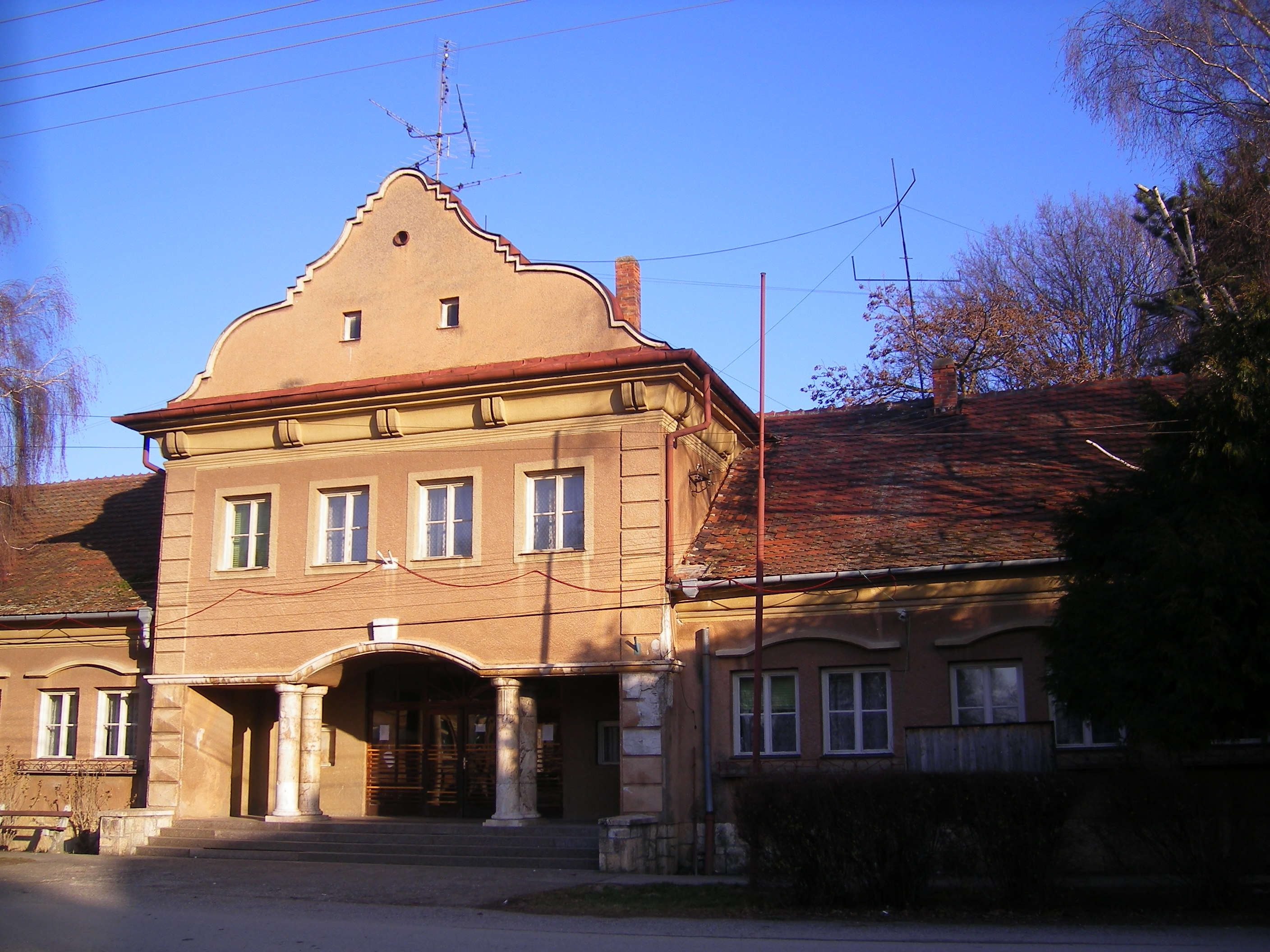 Ifjúságfalva